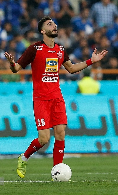 مهدی عبدی گلزن دربی ۳۱ شهریور ۱۳۹۸